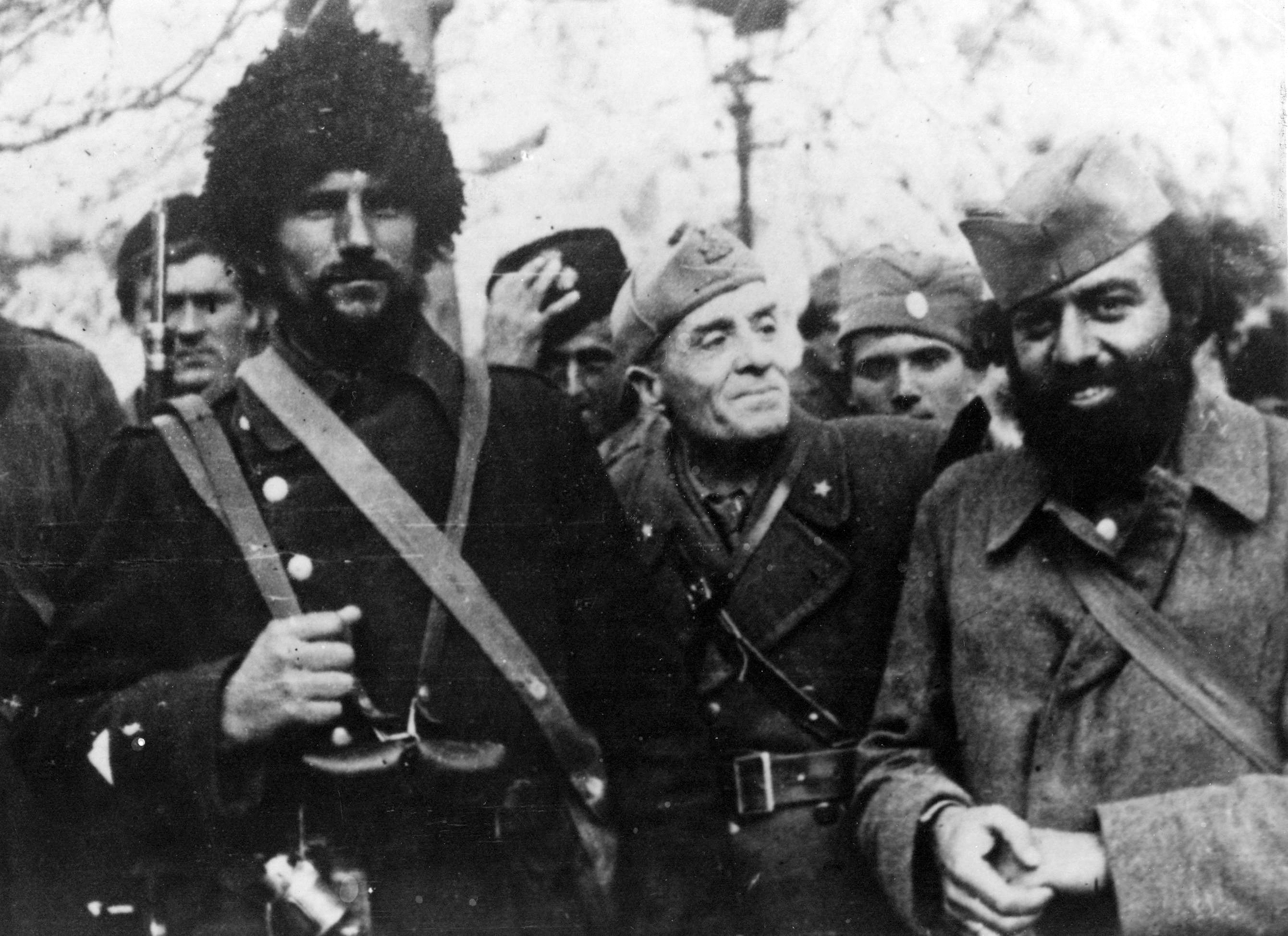 Srpskohrvatski / српскохрватски: Italijanski oficir u društvu četnika.